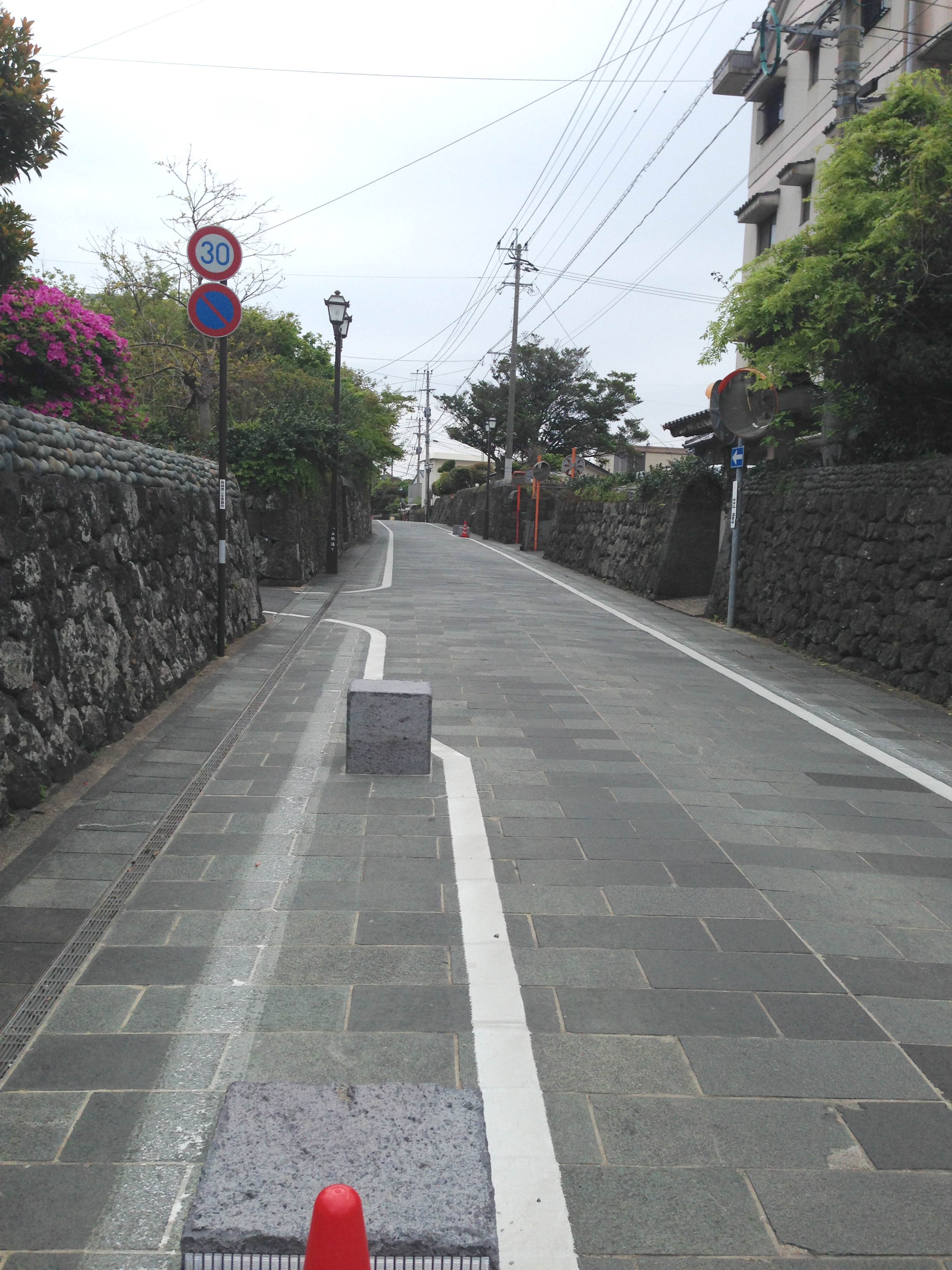 五島列島福江島-武家屋敷通り